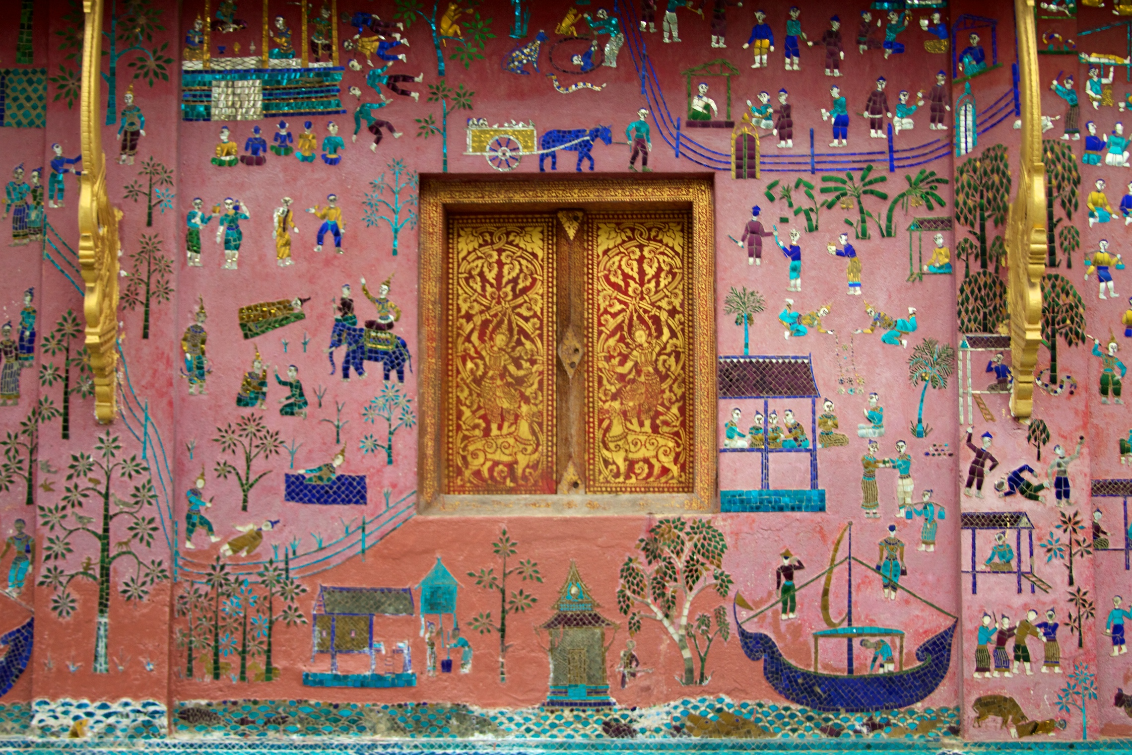 Laos - Luang Prabang 103 - gorgeous wall at Wat Xieng Thong